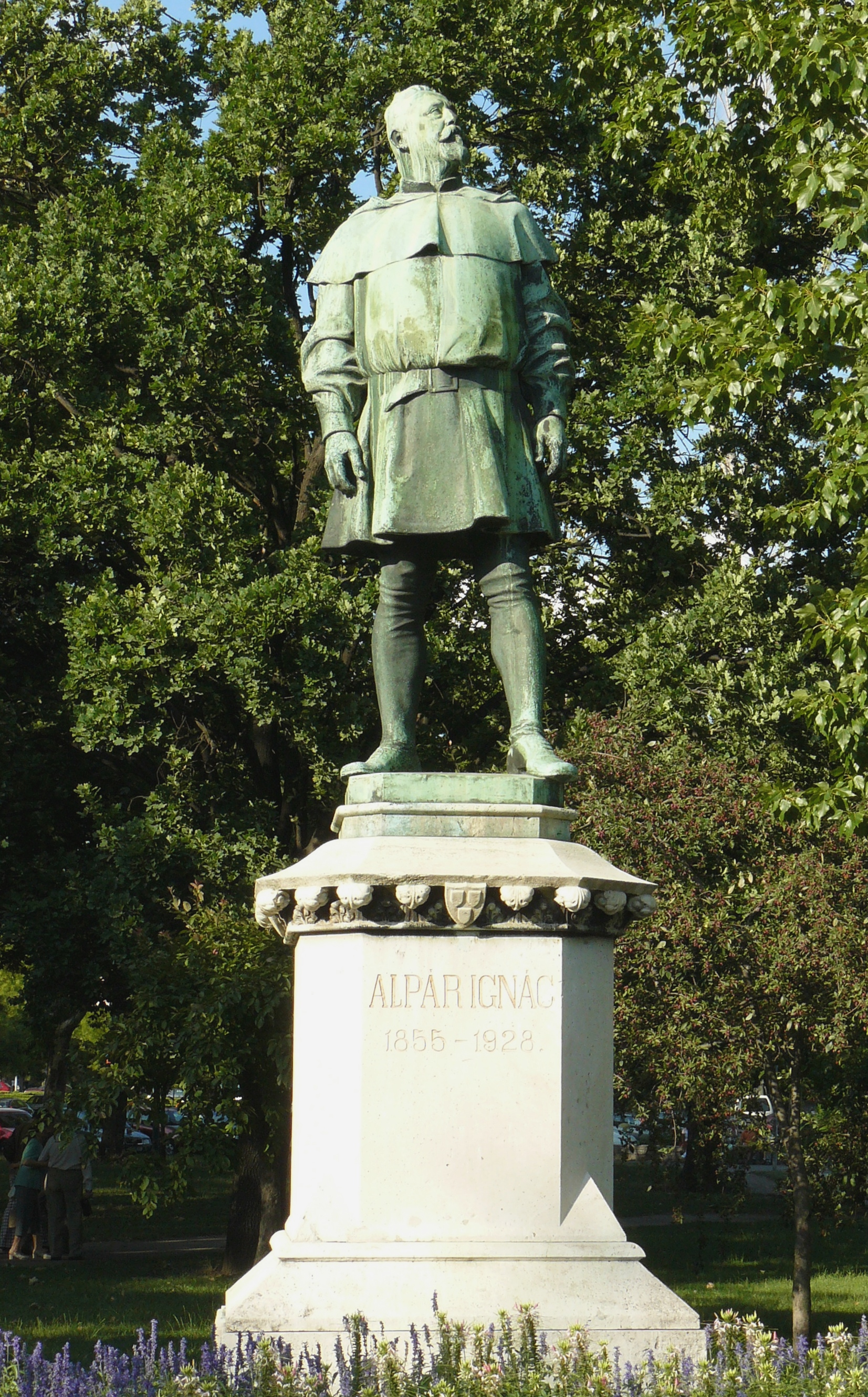 Alpár Ignác szobra a budapesti Vajdahunyadvárban